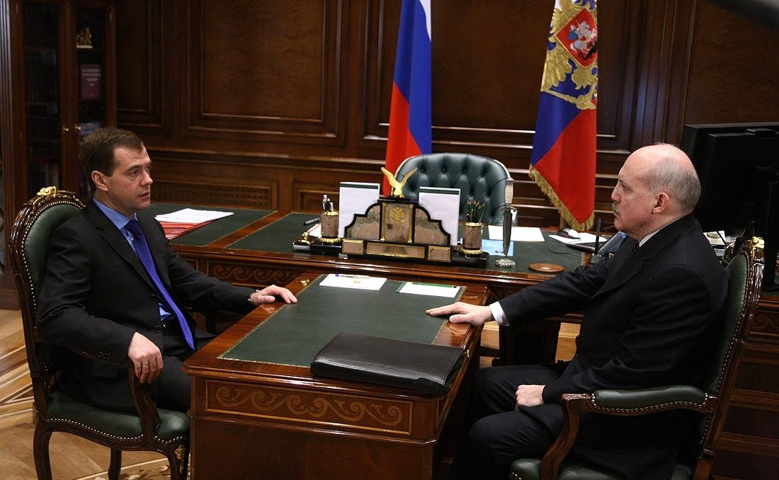 Дмитрий Медведев, Дмитрий Мезенцев